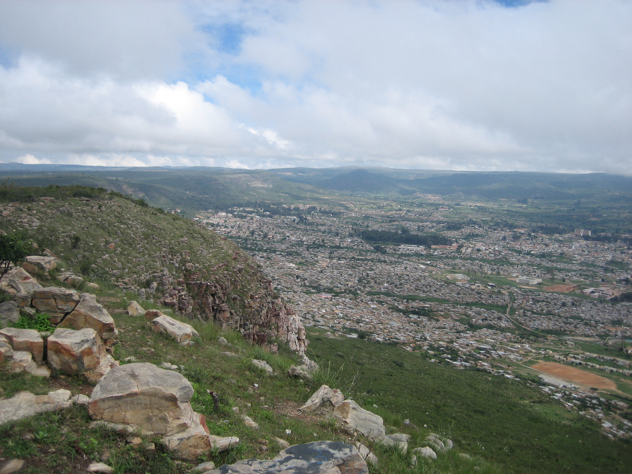 sight of Lubango, Angola